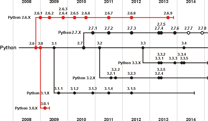 Línea Cronológica de Python